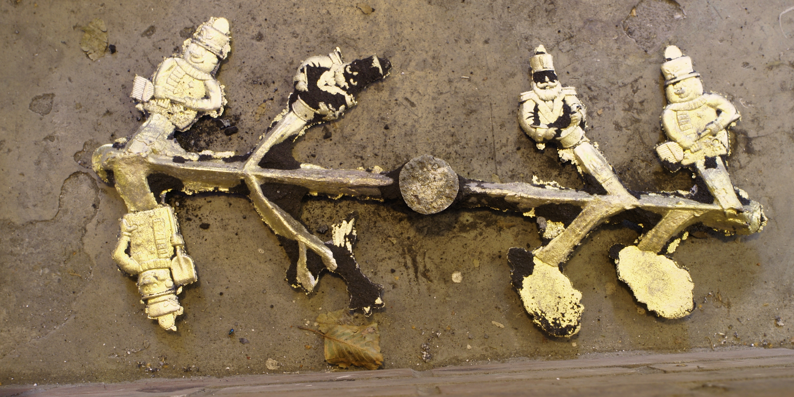 22. Wikipedia-Sauerlandstammtisch, Besuch in der Gelbgießerei des Museums in Iserlohn-Barendorf (Maste Barendorf), fertiges Gussobjekt mit Formsandresten